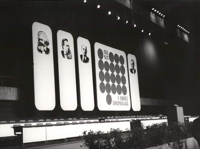 Srpski (latinica): Drugi kongres Samoupravljača u Sarajevu 1971.